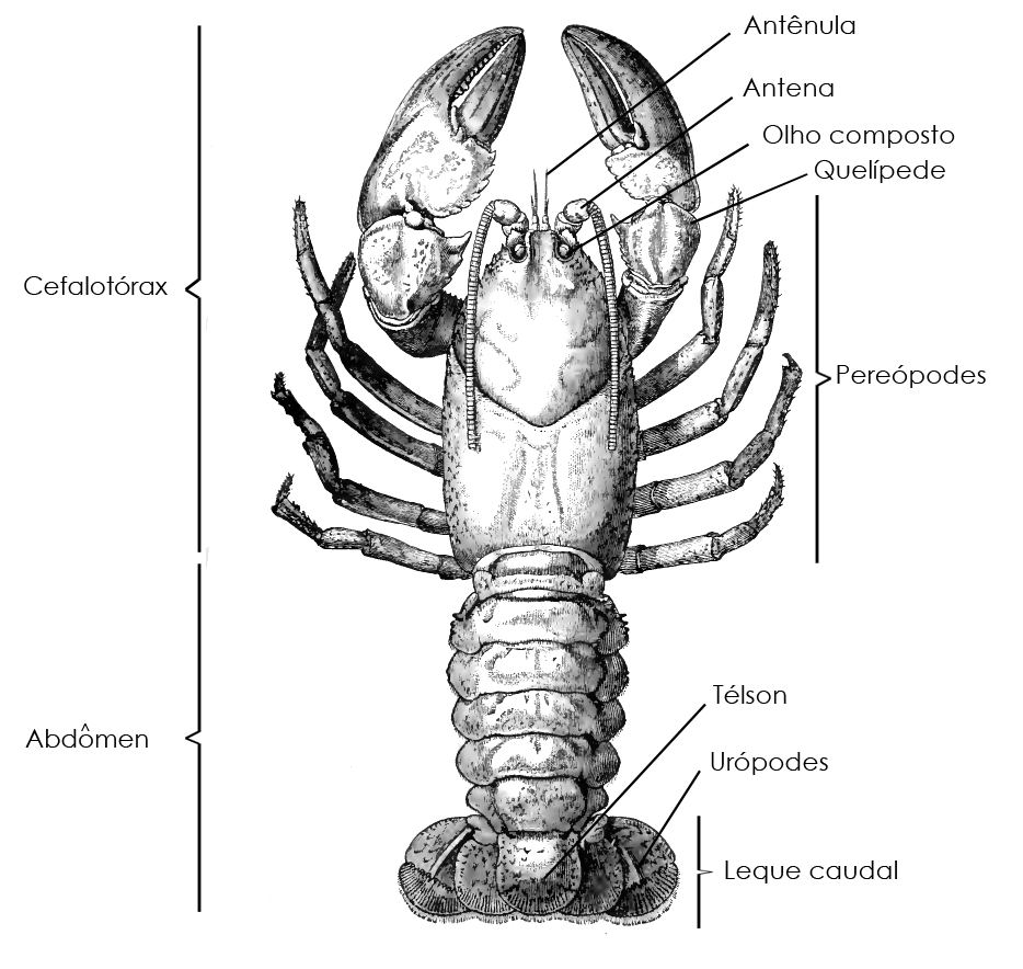 Esquema geral da morfologia de Astacideas